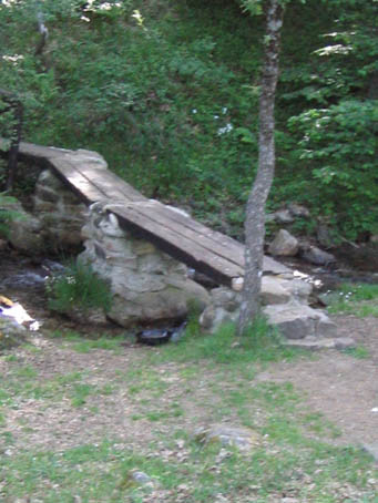 River in La Acebeda (Madrid)